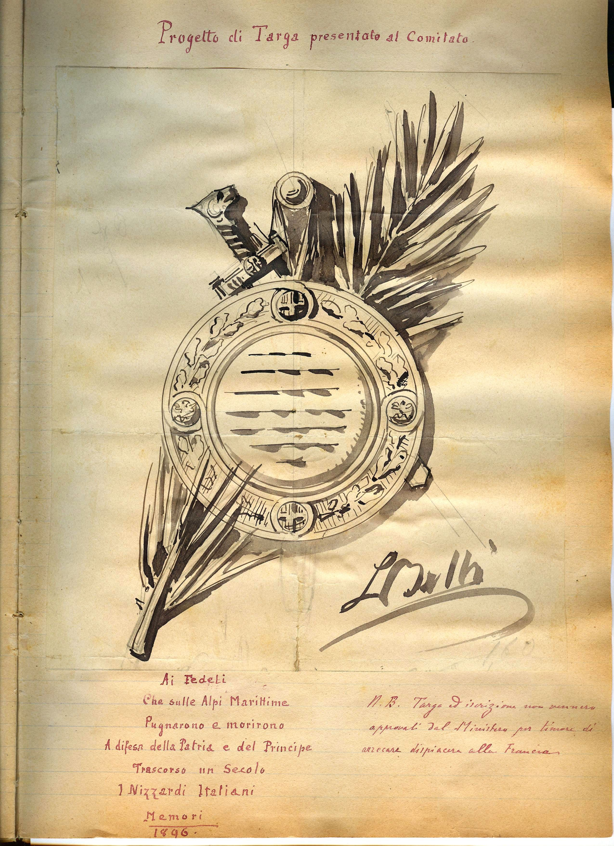 Targa, iscrizione ed archiviazione della contro-manifestazione irredentista nizzarda del 1896